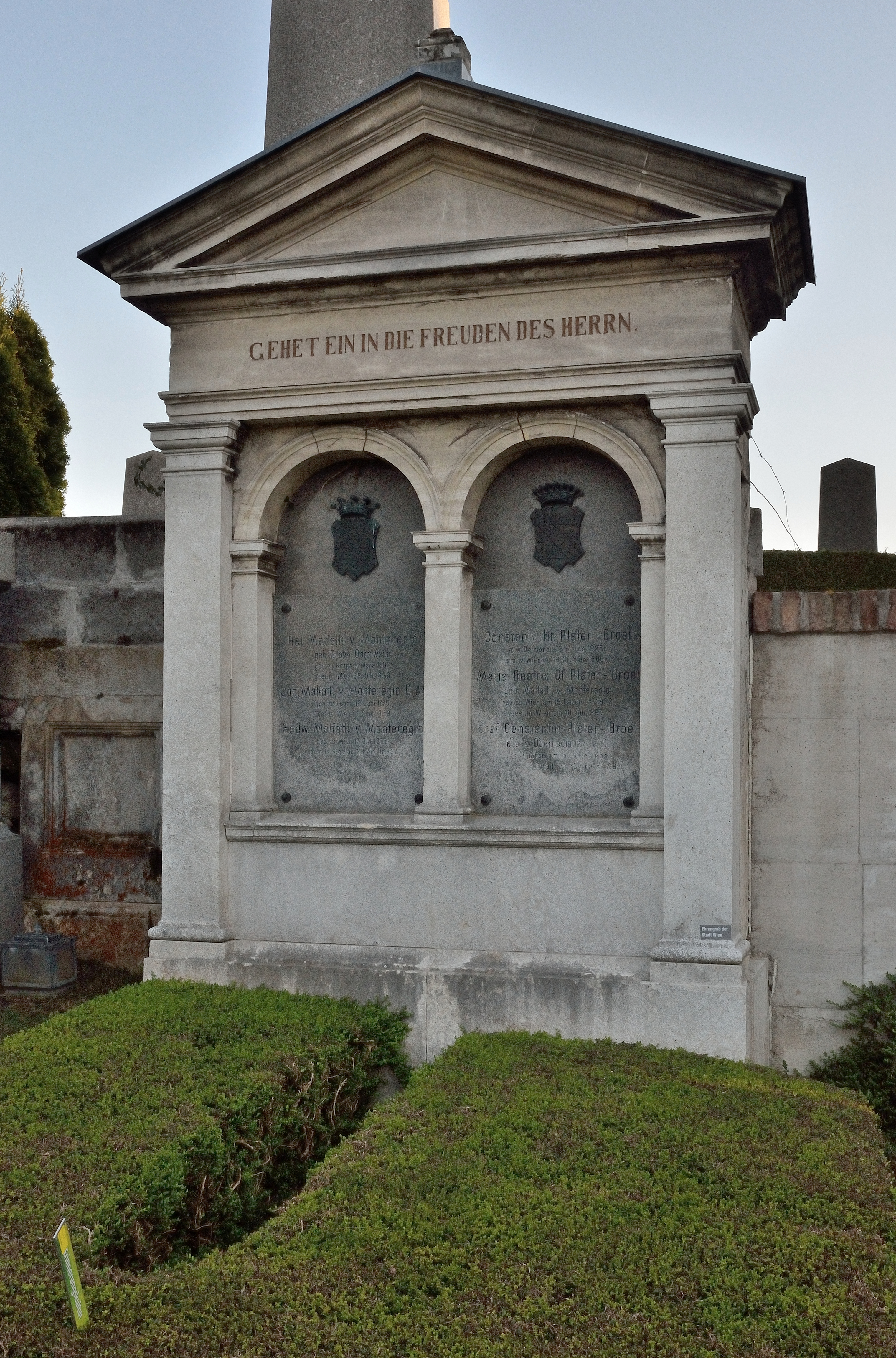 Grabmal von Johann Malfatti (Johann Baptist Malfatti von Monteregio) am Hietzinger Friedhof, Gruppe 3, Nr. 5.